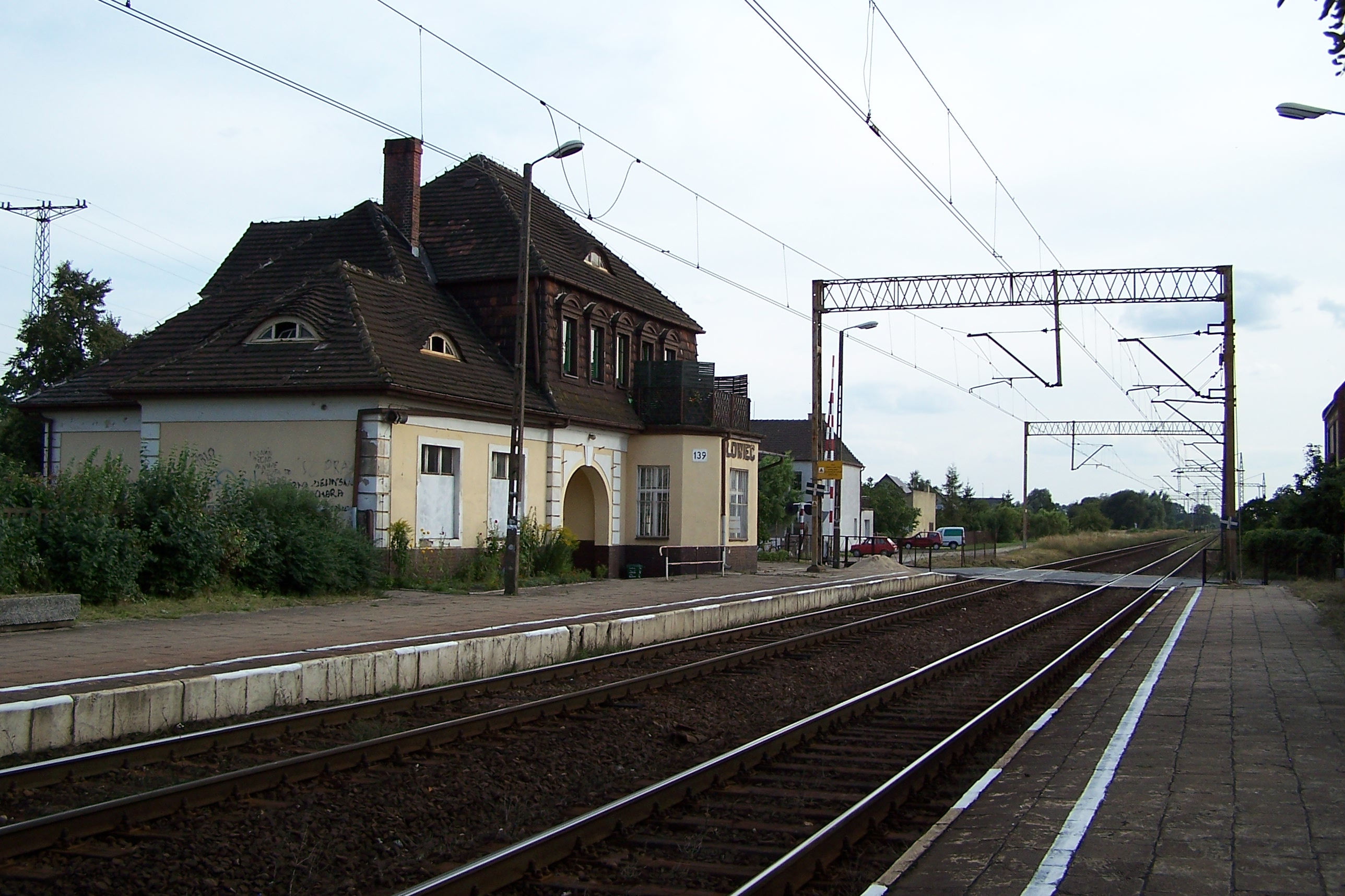 Przystanek kolejowy Iłowiec